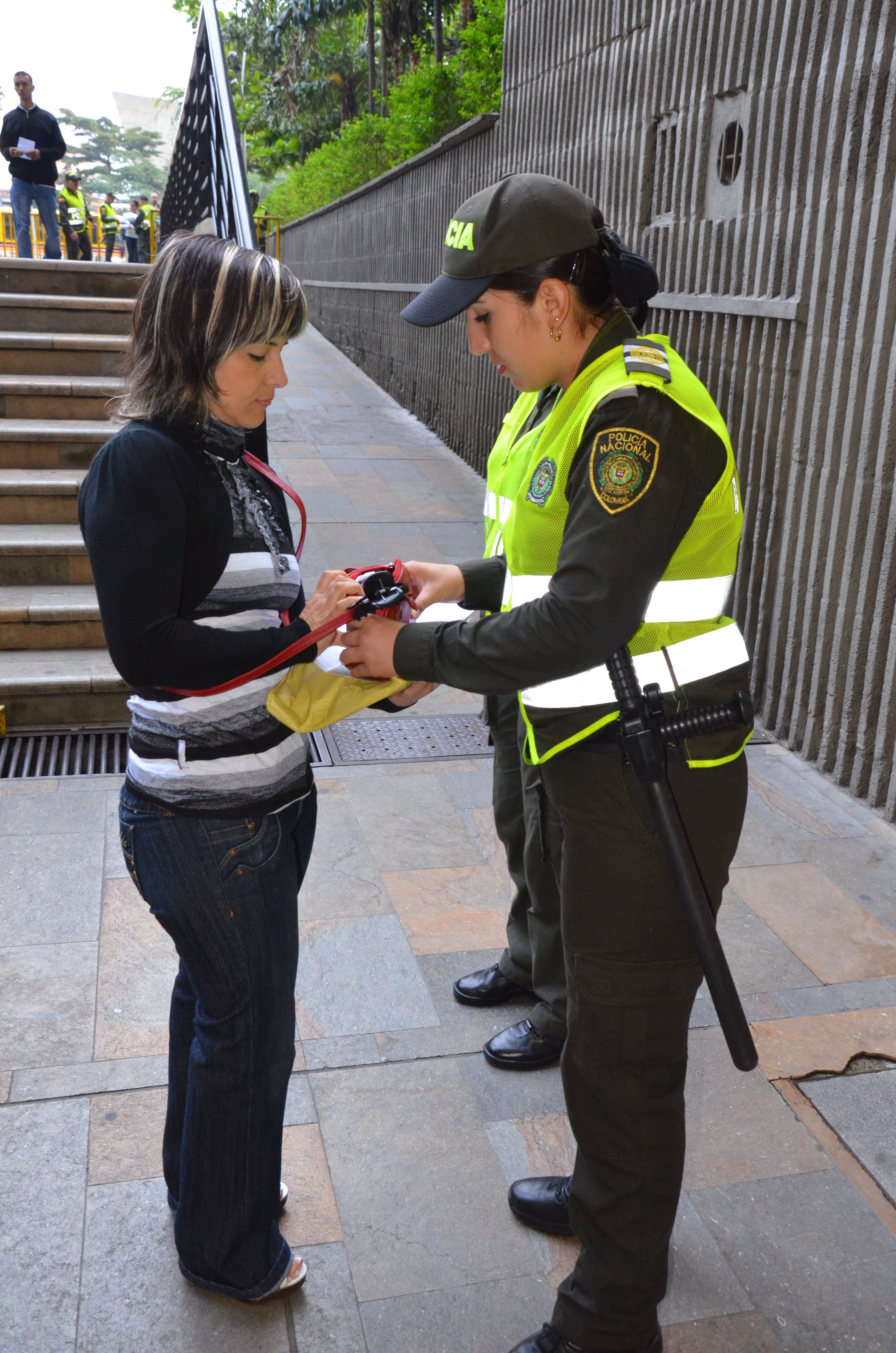 En Medellín estamos garantizando el derecho al voto.